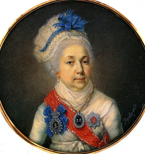 Анна Алексеевна Матюшкина, ур.Гагарина (1722-3.05.1804).